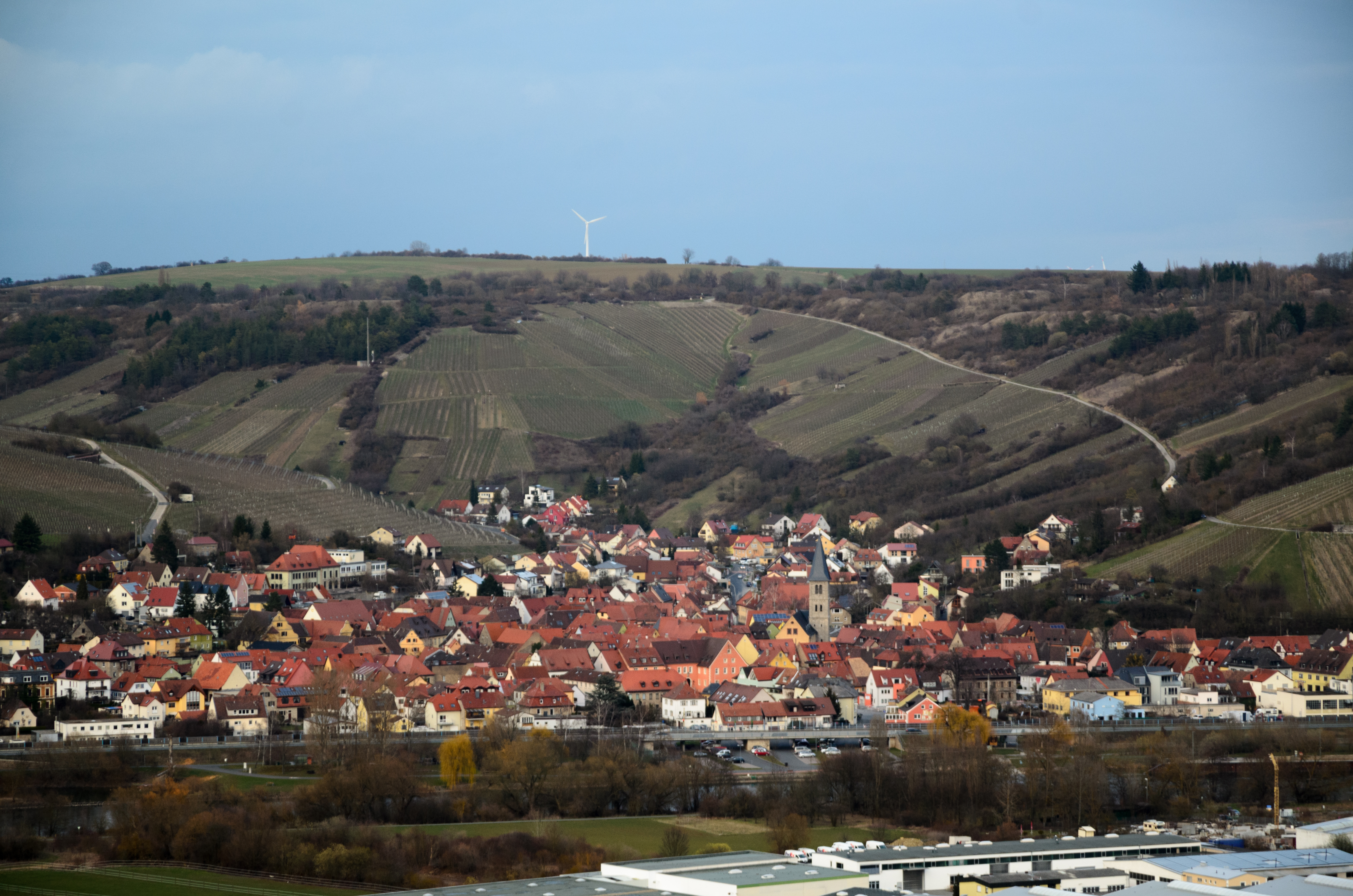 Randersacker, Panorama von Süden